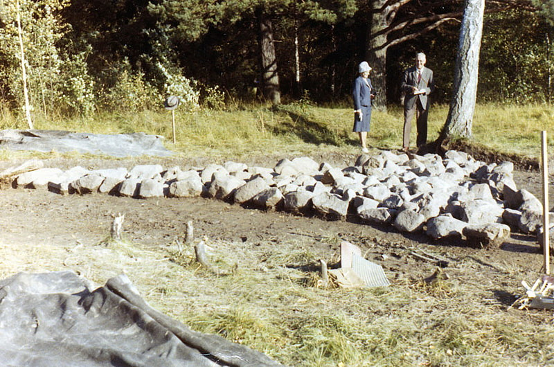 Utgrävning av gravfält 300 meter öster om Råsta gård